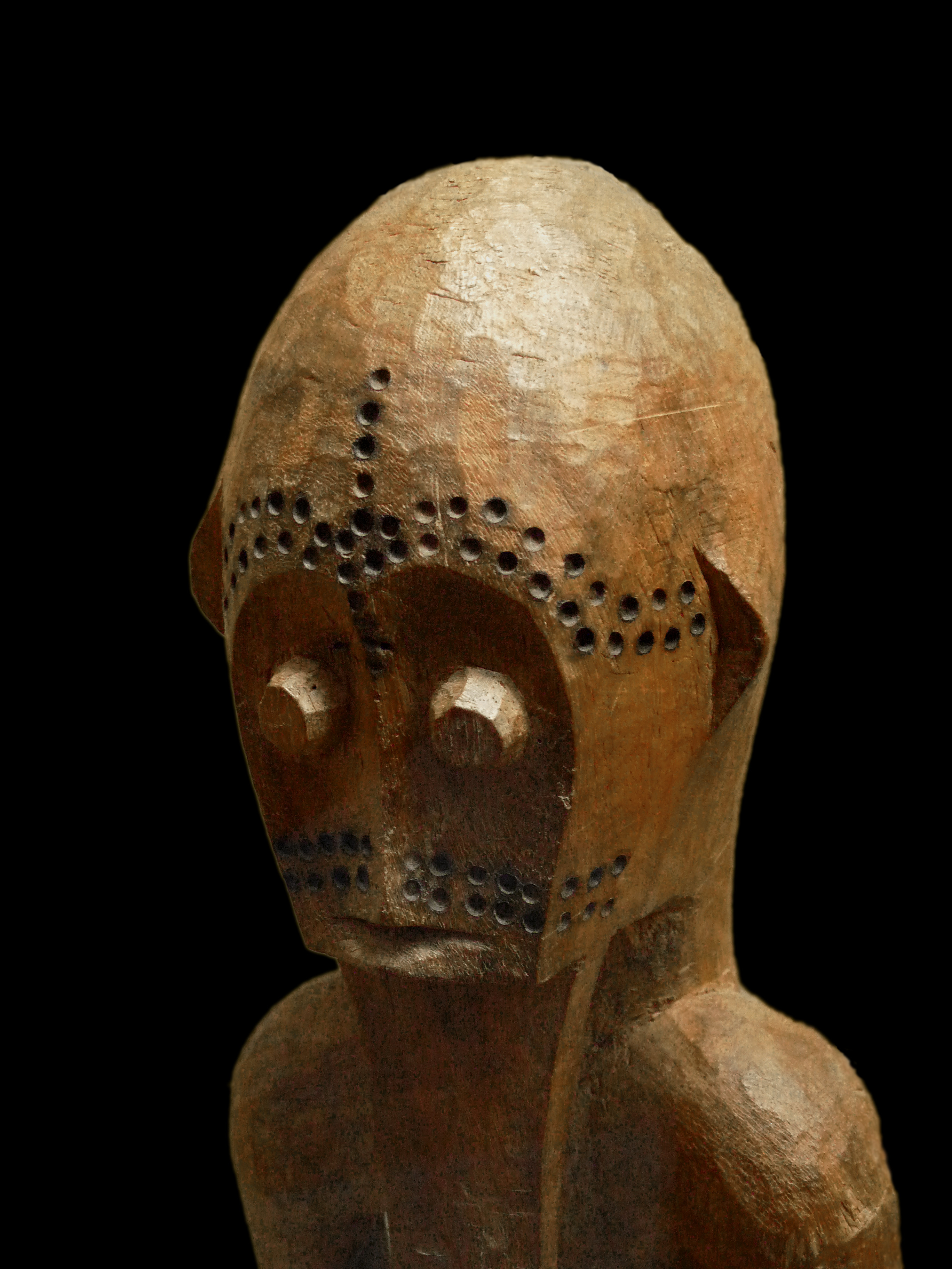 Metoko (Zaïre) : statuette placée pendant la période de deuil sur la tombe d'un membre de la société kota. Musée royal de l'Afrique centrale